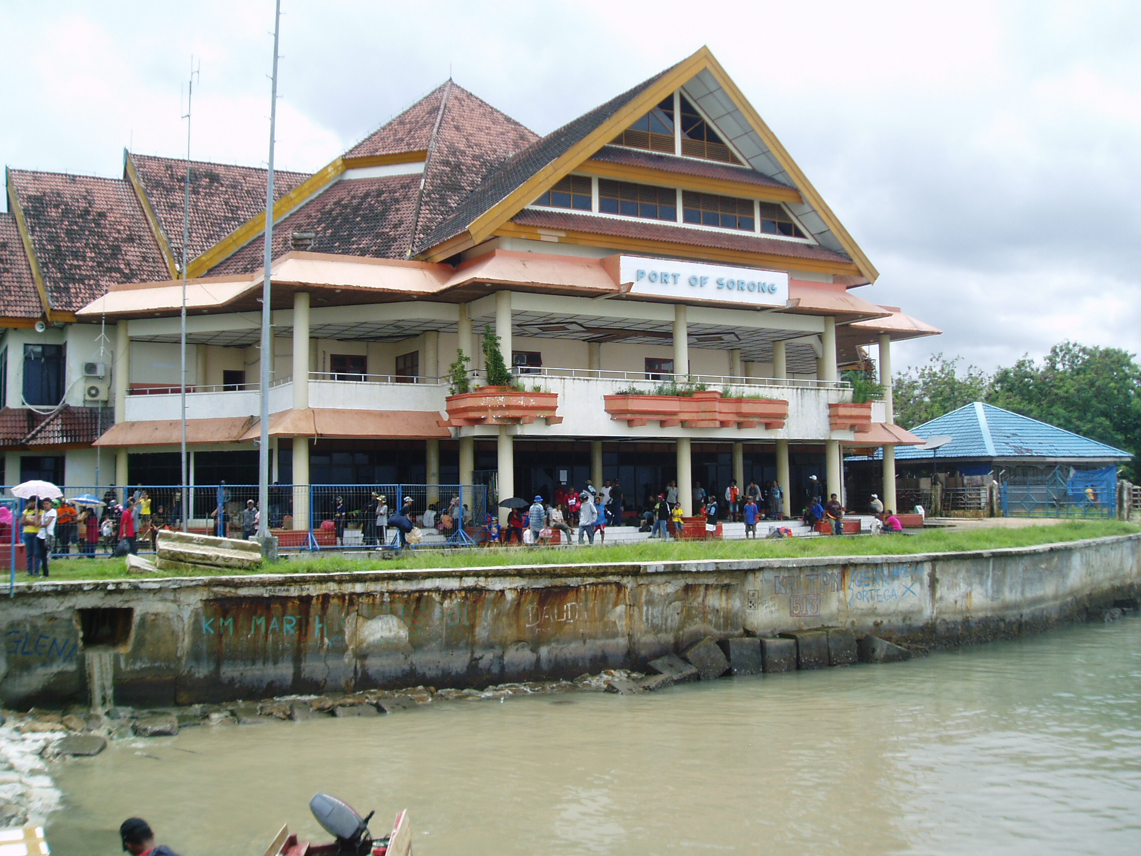 Havengebouw van Sorong (West-Papoea, Indonesië). Transitpunt voor Pelni-schepen.